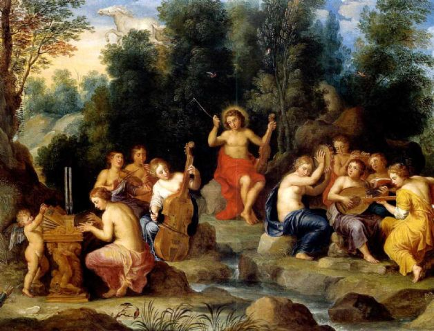 Apollo und die neun Musen auf dem Berg Helikon bei der Quelle Hippokrene